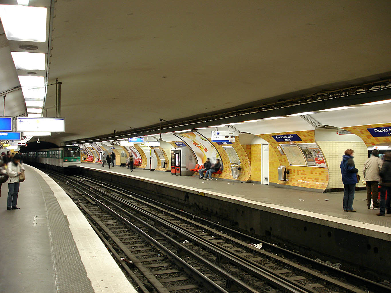 Station Charles de Gaulle - Étoile de la ligne 2 du métro de Paris, France.